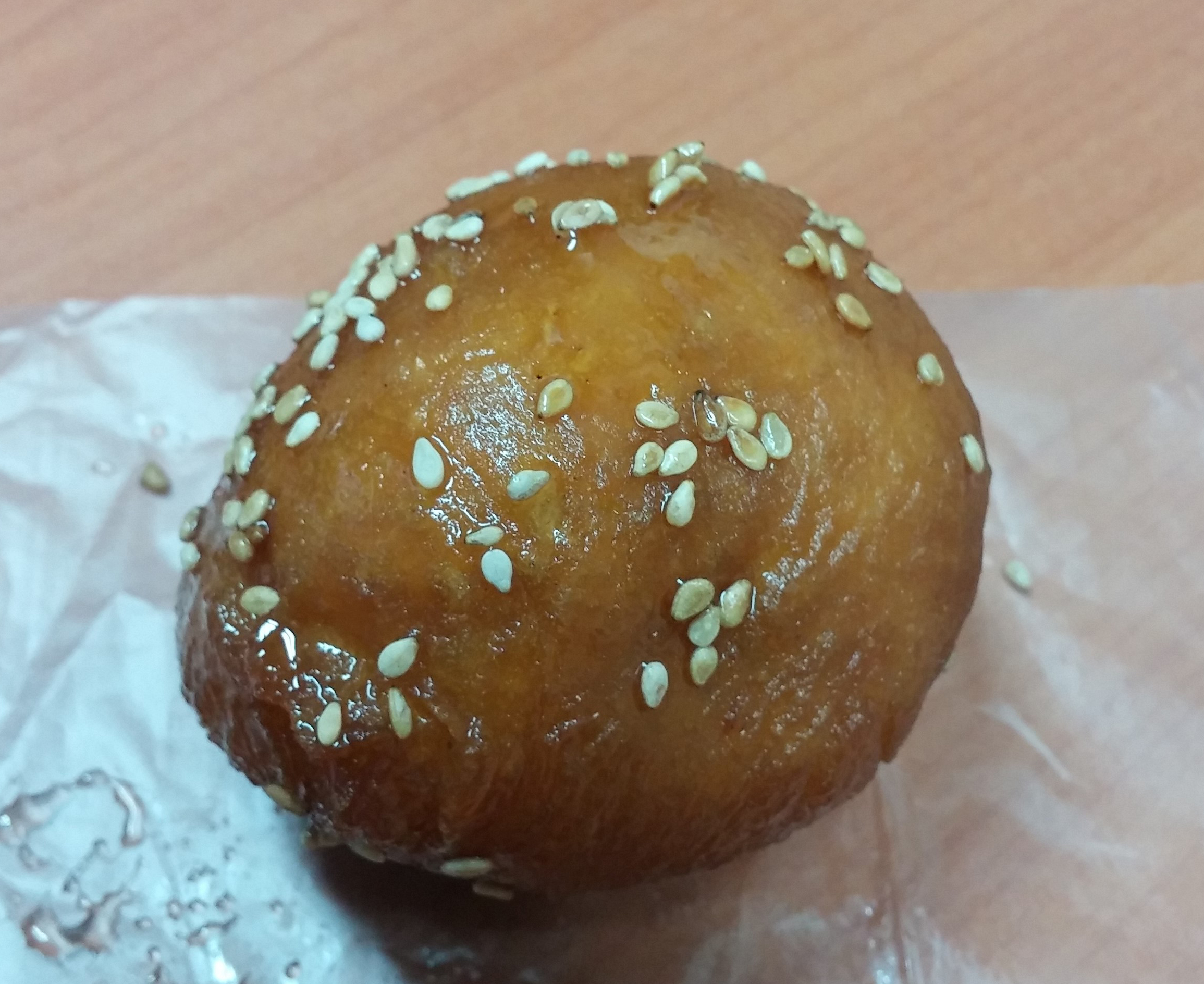 통영꿀빵-(1)